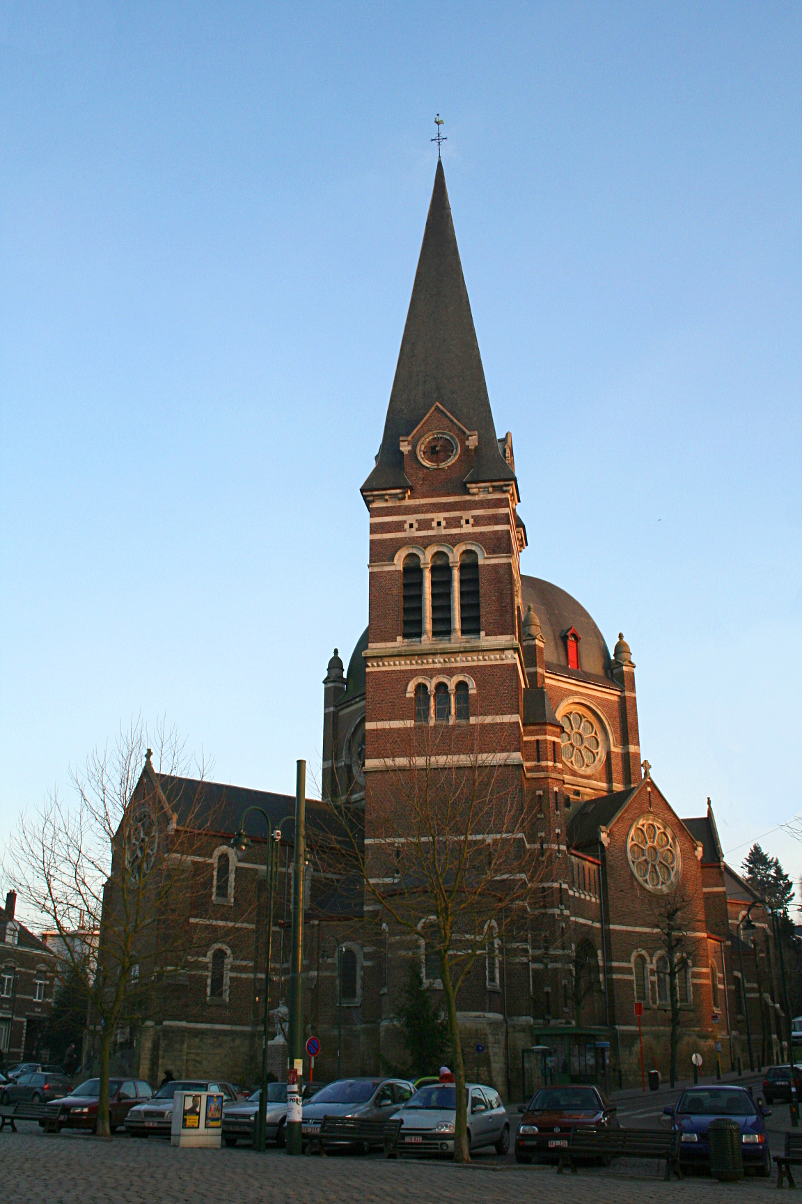 Uccle (Belgique), l'église Saint-Job construite en 1911 par l'architecte Jules Bilmeyer.